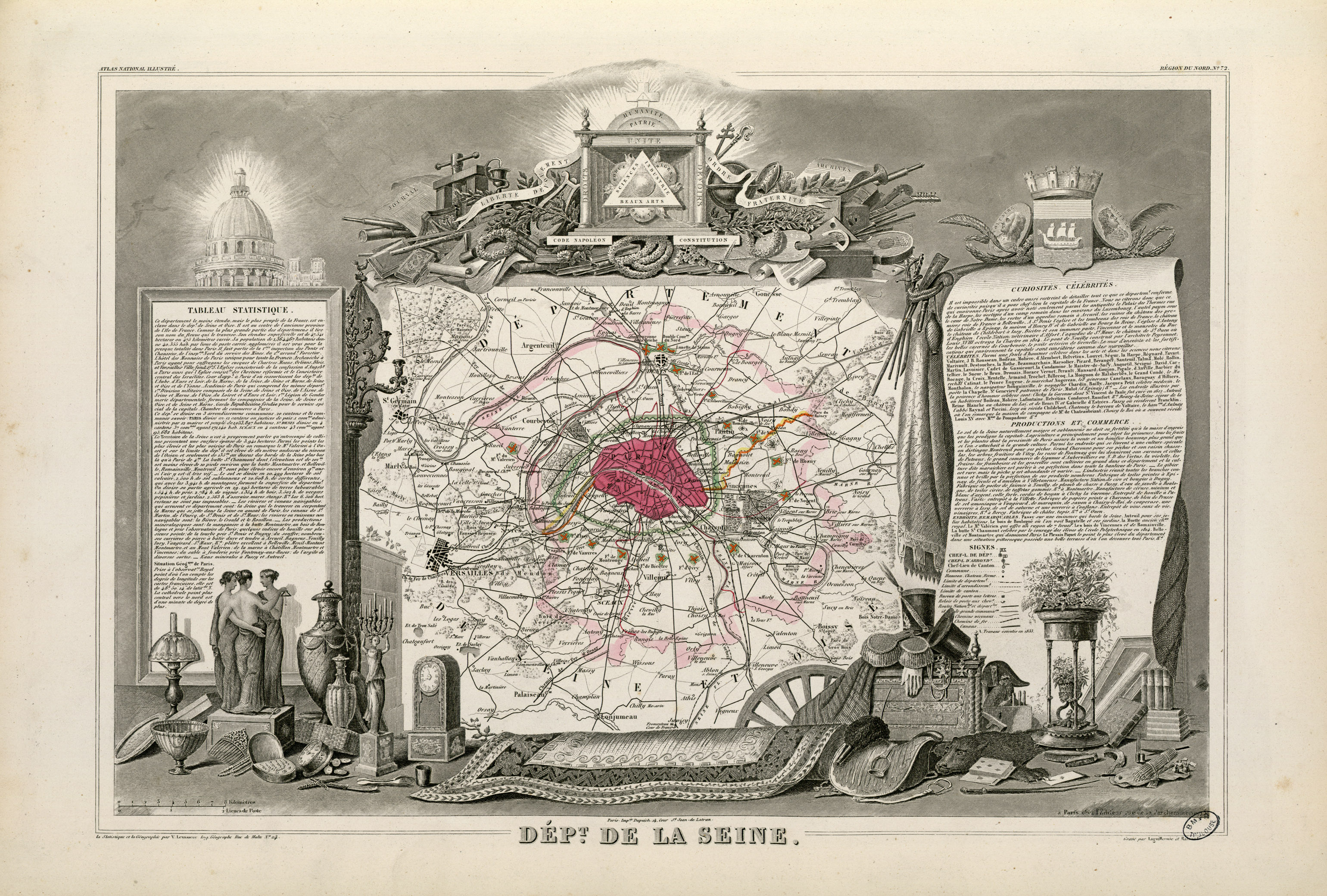 Titre complet du recueil : Atlas national illustré des 86 Départements et des Possessions de la France divisé par Arrondissements, Cantons et Communes avec le tracé de toutes les routes, chemins de fer et canaux. Dressé d'après les Travaux du Cadastre du Dépôt de la Guerre et des Ponts et Chaussées par V. Levasseur, Ingénieur Géographe attaché au Génie du Cadastre et de la Ville de Paris. Gravé sur acier par les meilleurs artistes. Imprimerie de Lemercier à Paris ou imprimerie Dupuich à Paris. Page de titre et 100 pl. en n. et b. et en coul. dont un tableau statistique et 2 cartes dépliantes. Ancely, René (1876 - 1966). Possesseur